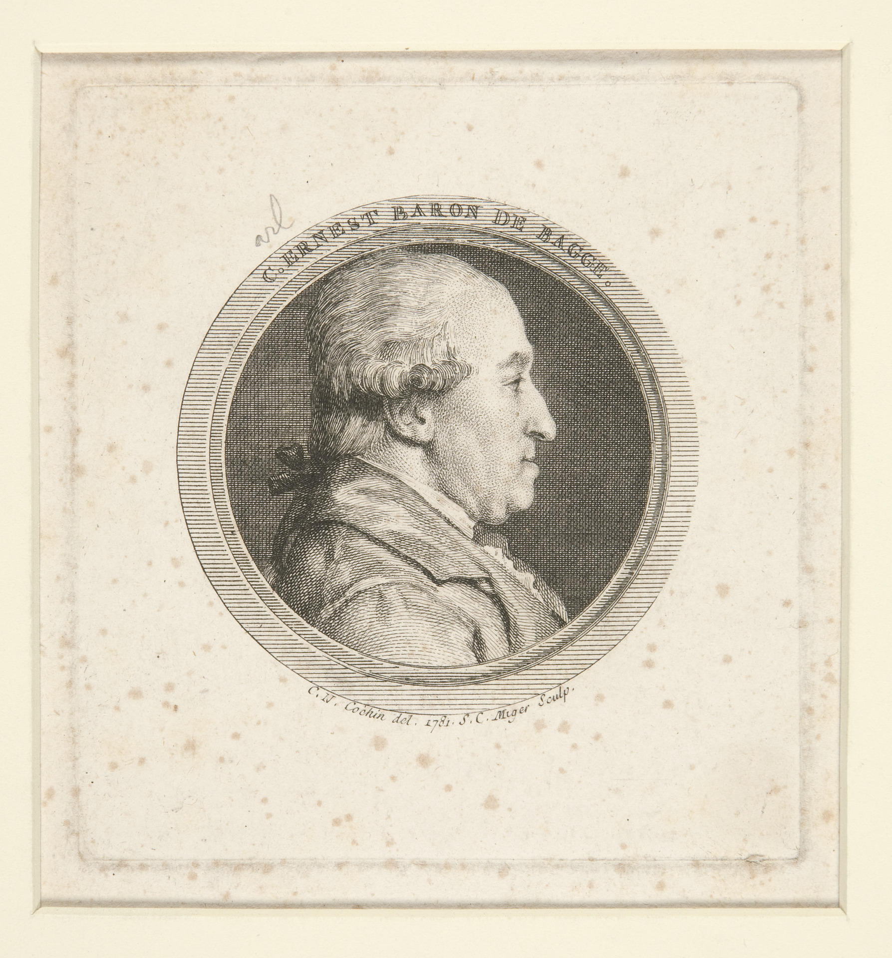 Kupferstich - Portrait des kurländischen Barons Carl Ernst Bagge von Boo